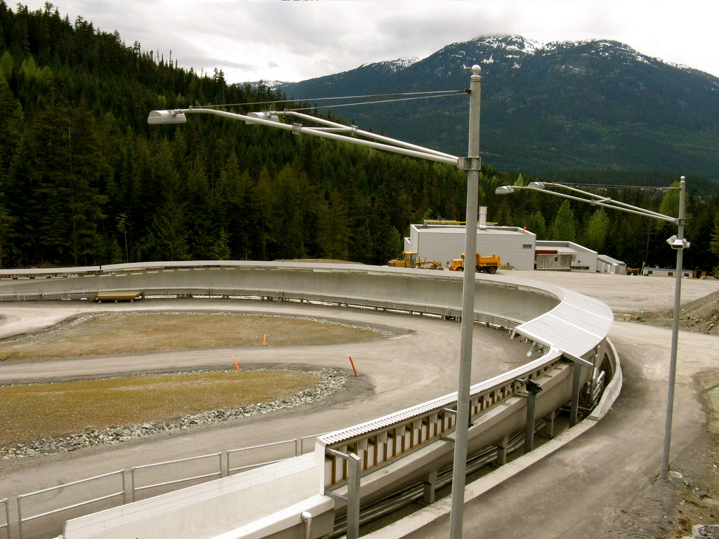 Piste de bobsleigh à Whitsler où se déroulera les JO de 2010 Bocht 16 (Thunderbird)